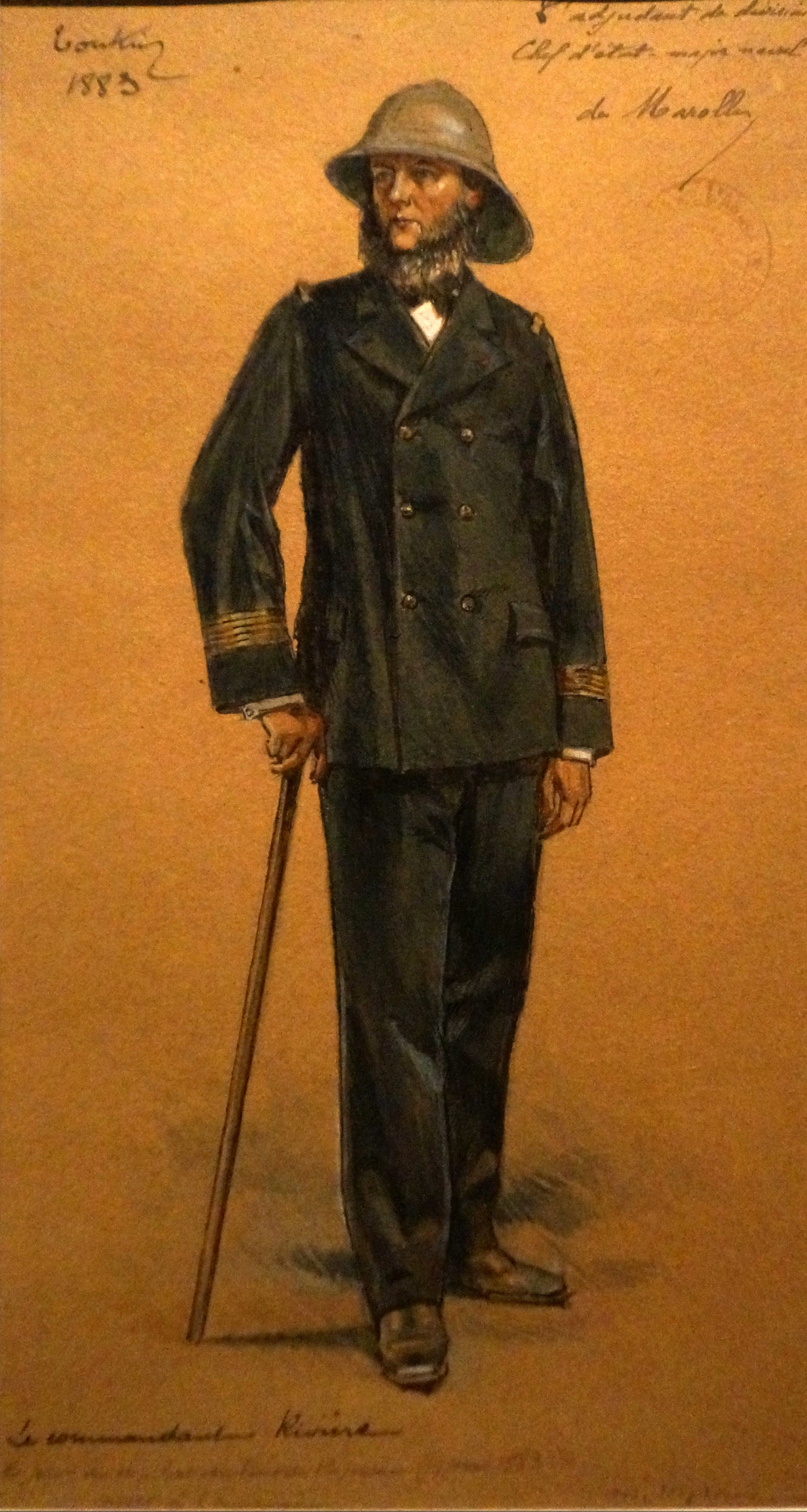 Le commandant Henri Laurent Rivière en 1883.